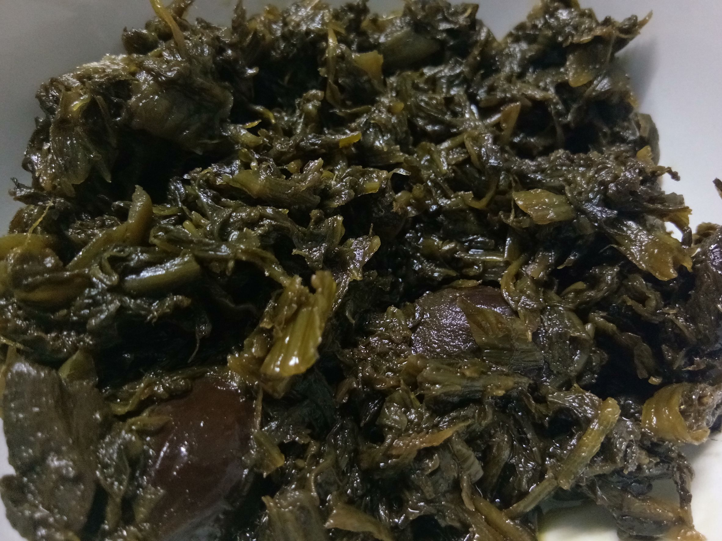 กานาฉ่าย อาหารที่นิยมทานในหมู่ชาวจีนแต้จิ๋ว